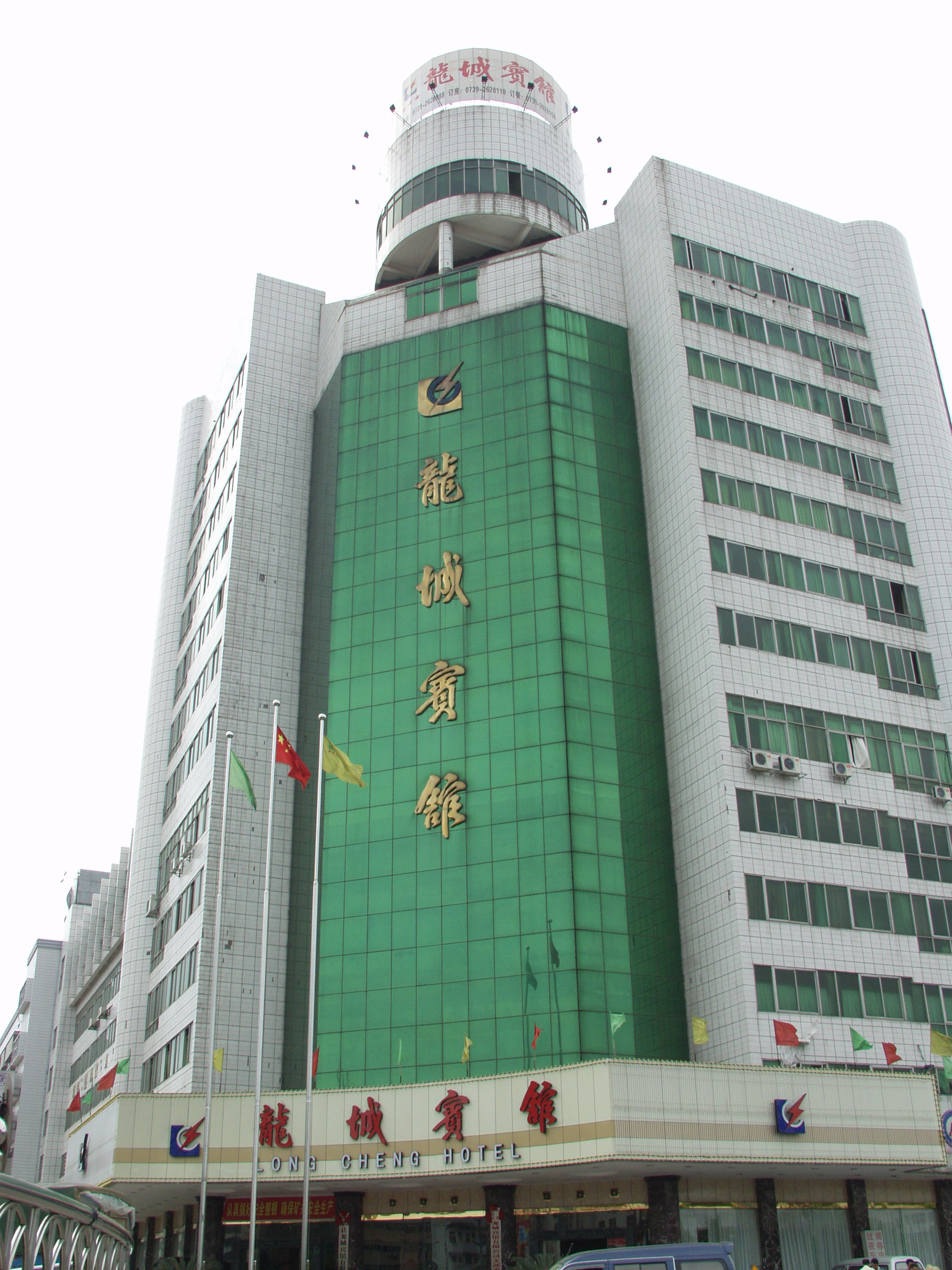 本人制作